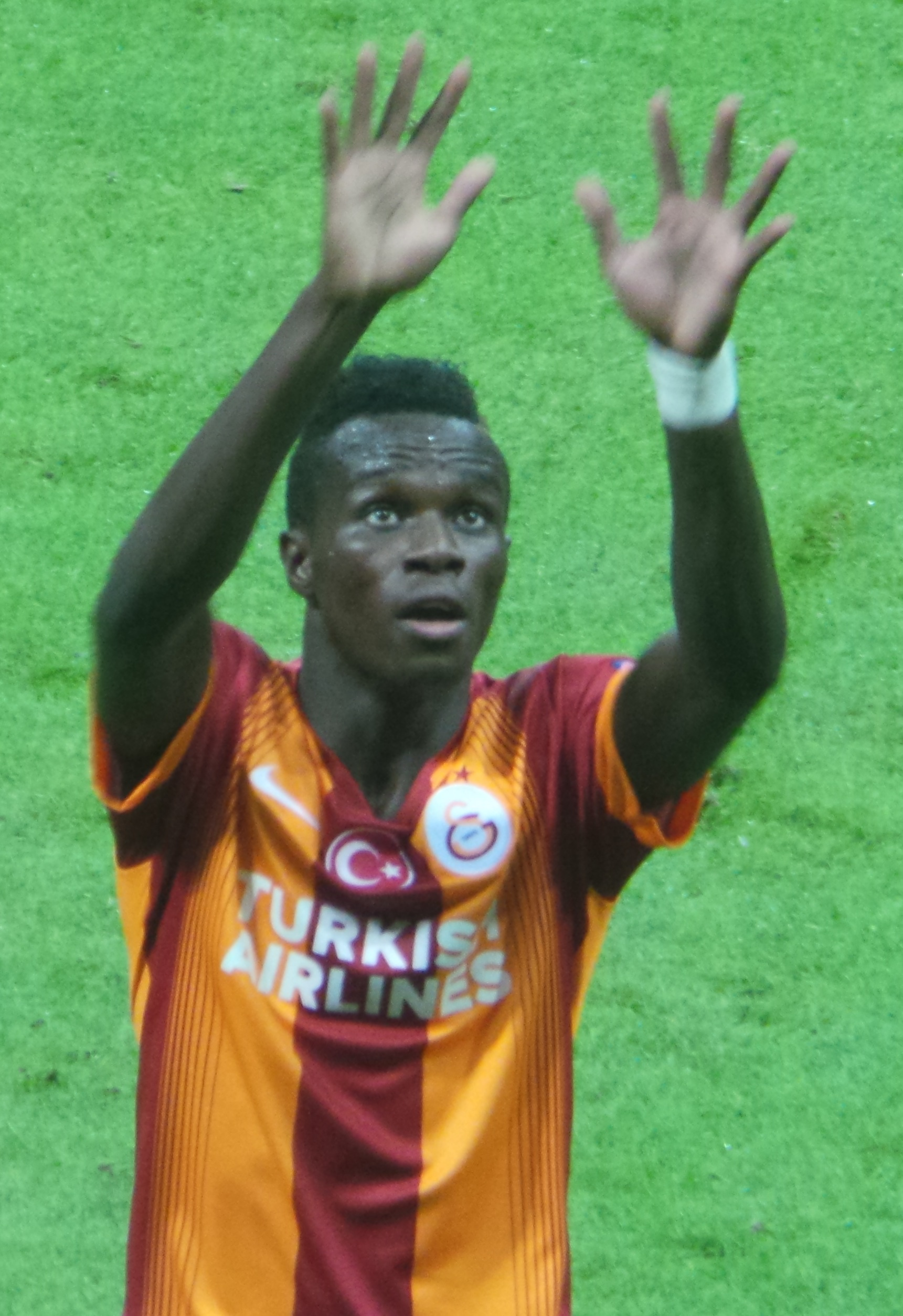 Bruma